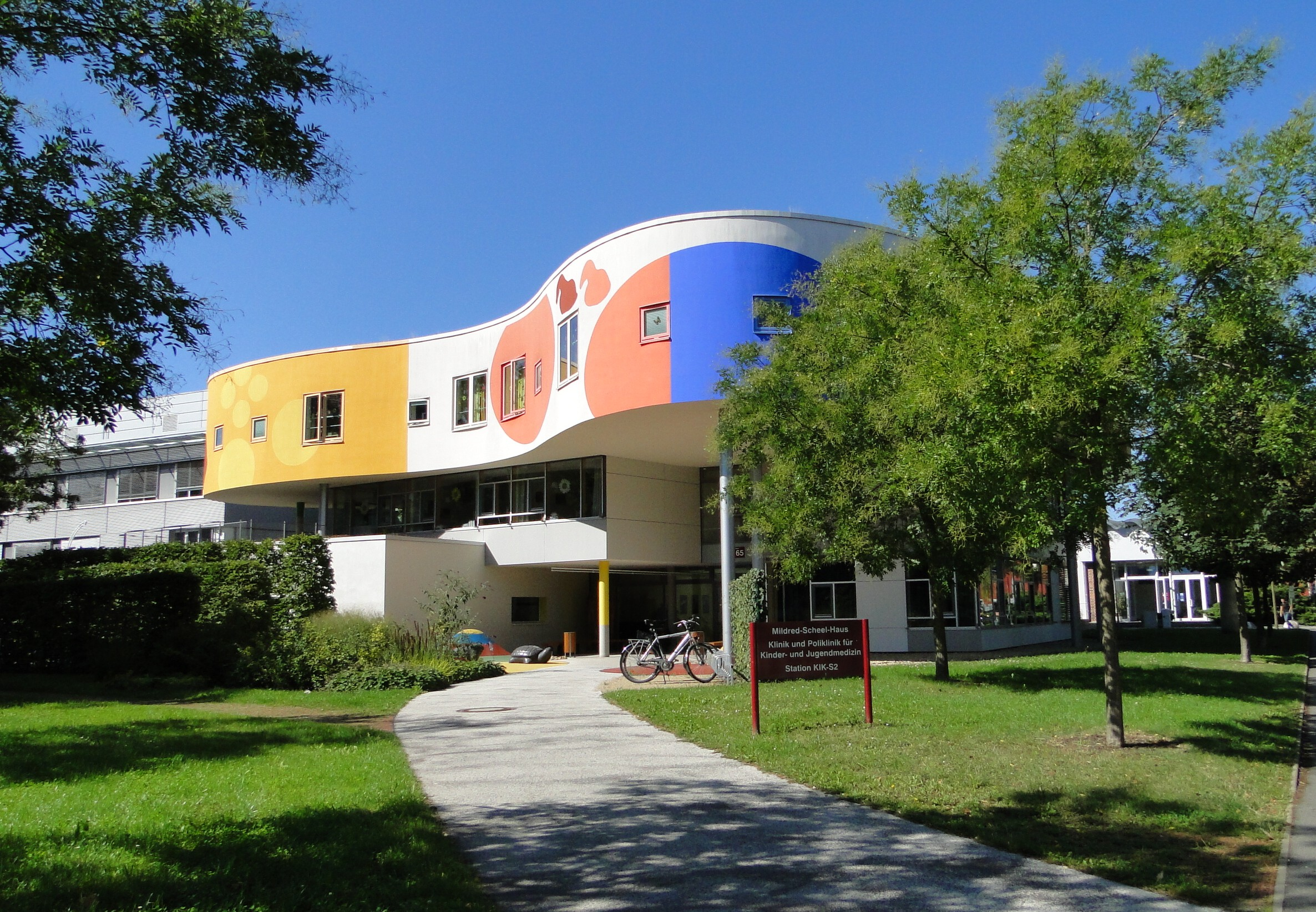 Mildred-Scheel-Haus, Erweiterungsbau, des Universitätsklinikums in Dresden